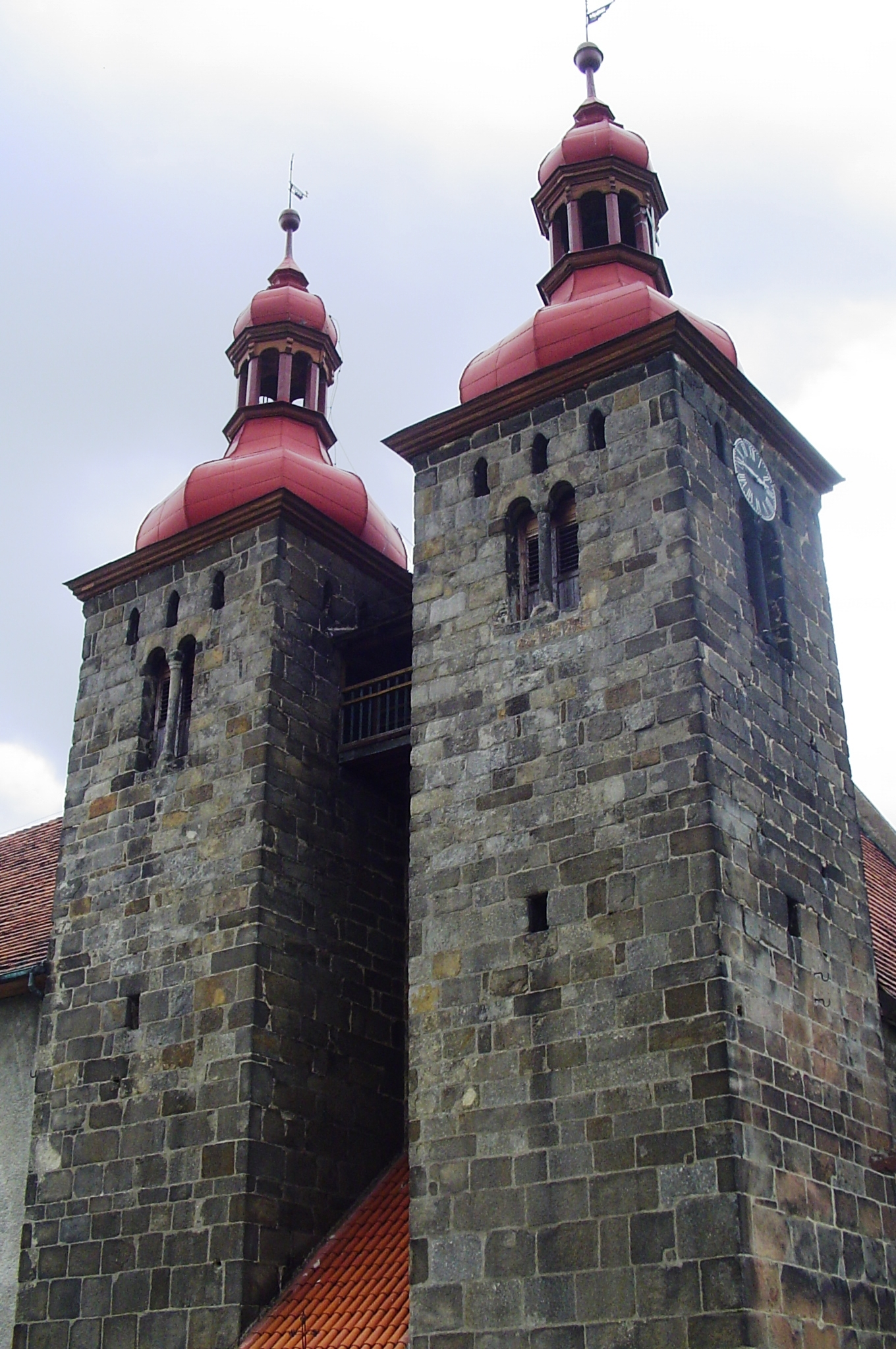 kościół rodowy, klasztorny Cystersów, ob. kościół par. p. w. Wniebowzięcia NMP- klasztor, ob. część korpusu kościoła, Wierzbna, pow. świdnicki